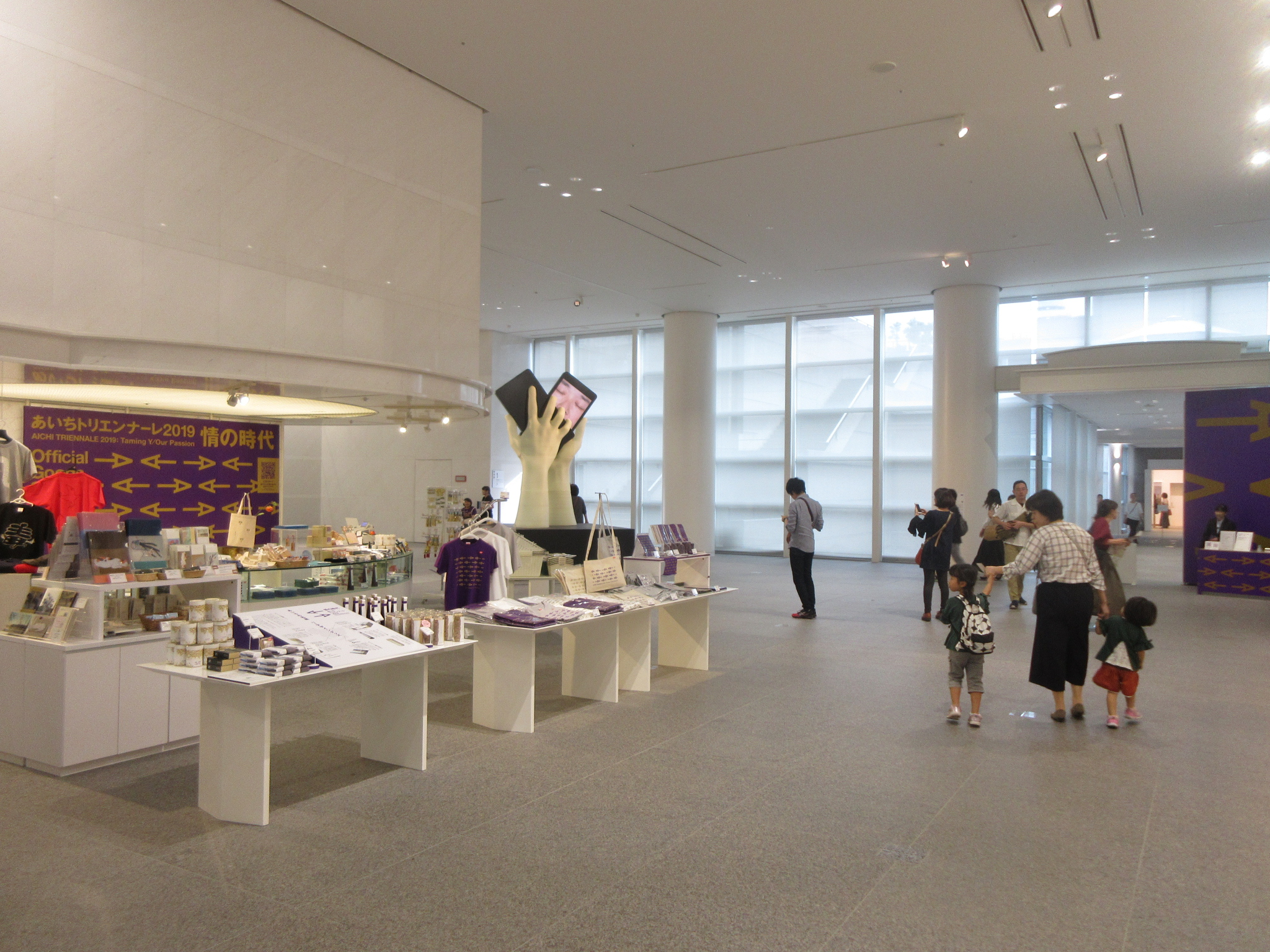 愛知県美術館（名古屋市東区東桜）。あいちトリエンナーレ2019の会期中。